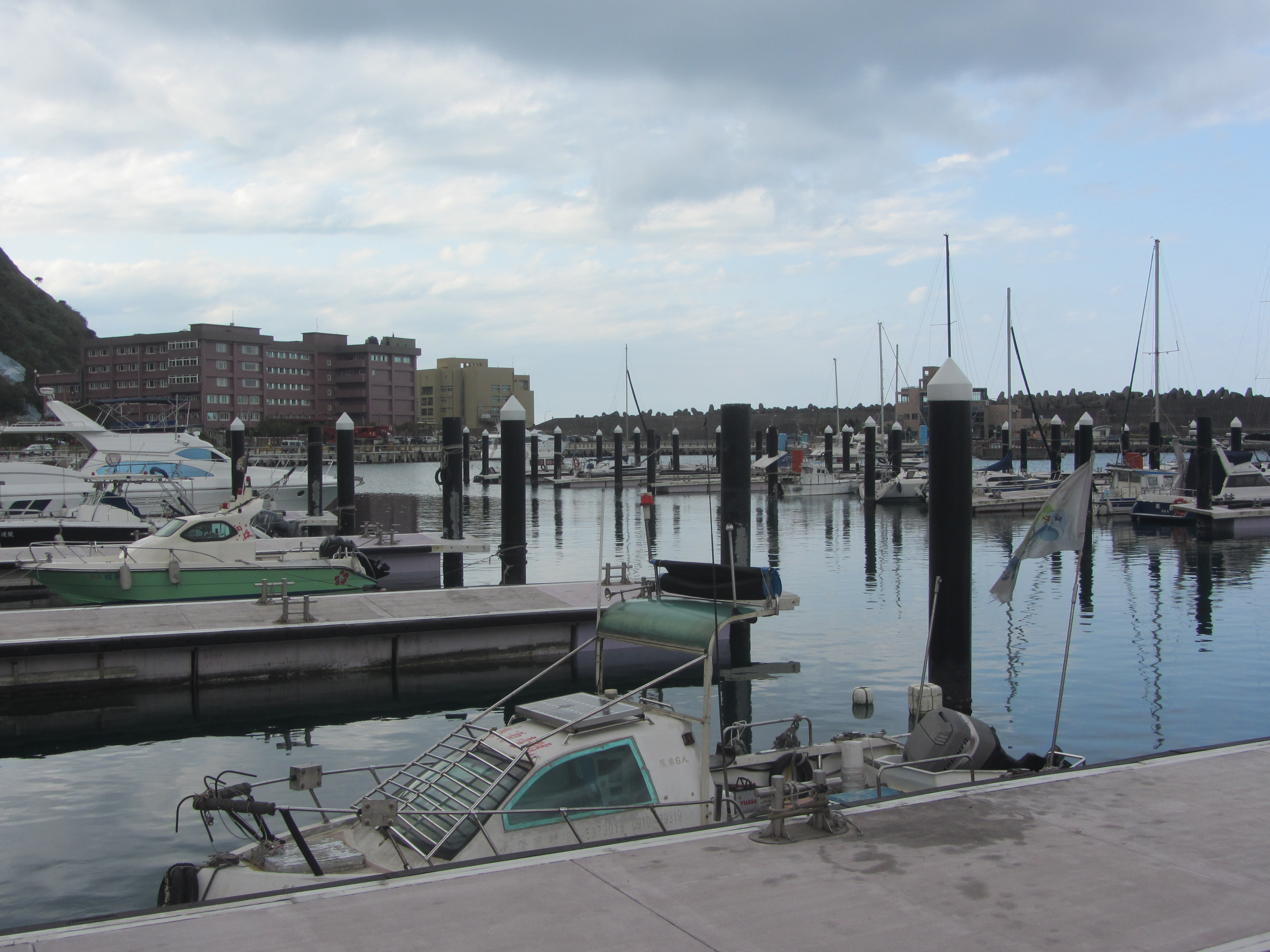 基隆市碧砂漁港一景